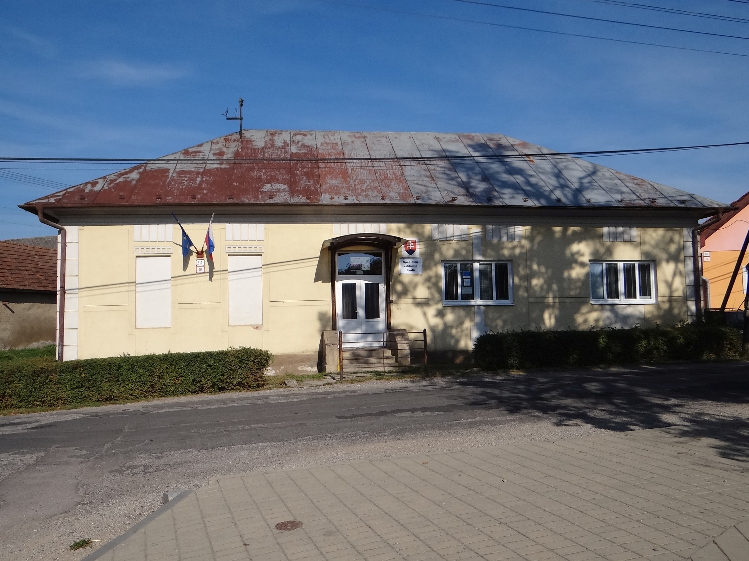 Letanovce